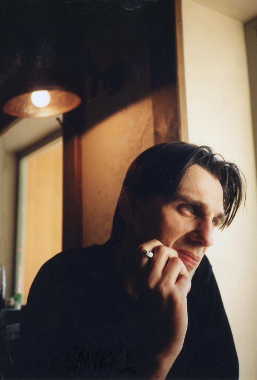 Александр Никласс фото